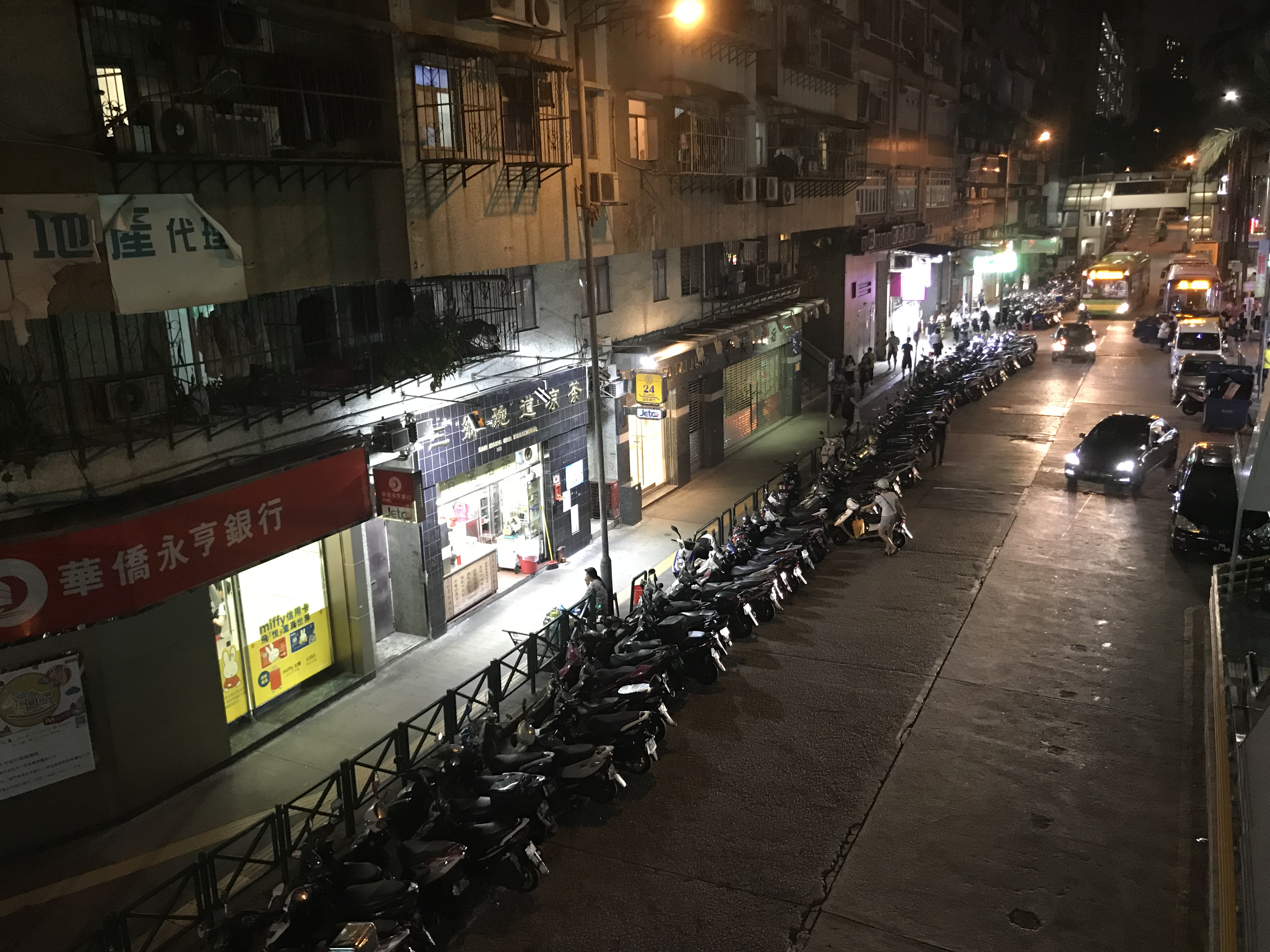 中文（台灣）: 晚上的巴波沙大馬路。